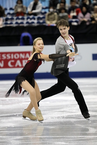 Арина Ушакова / Максим Некрасов (Россия) на финале юниорского Гран-при 2017-2018